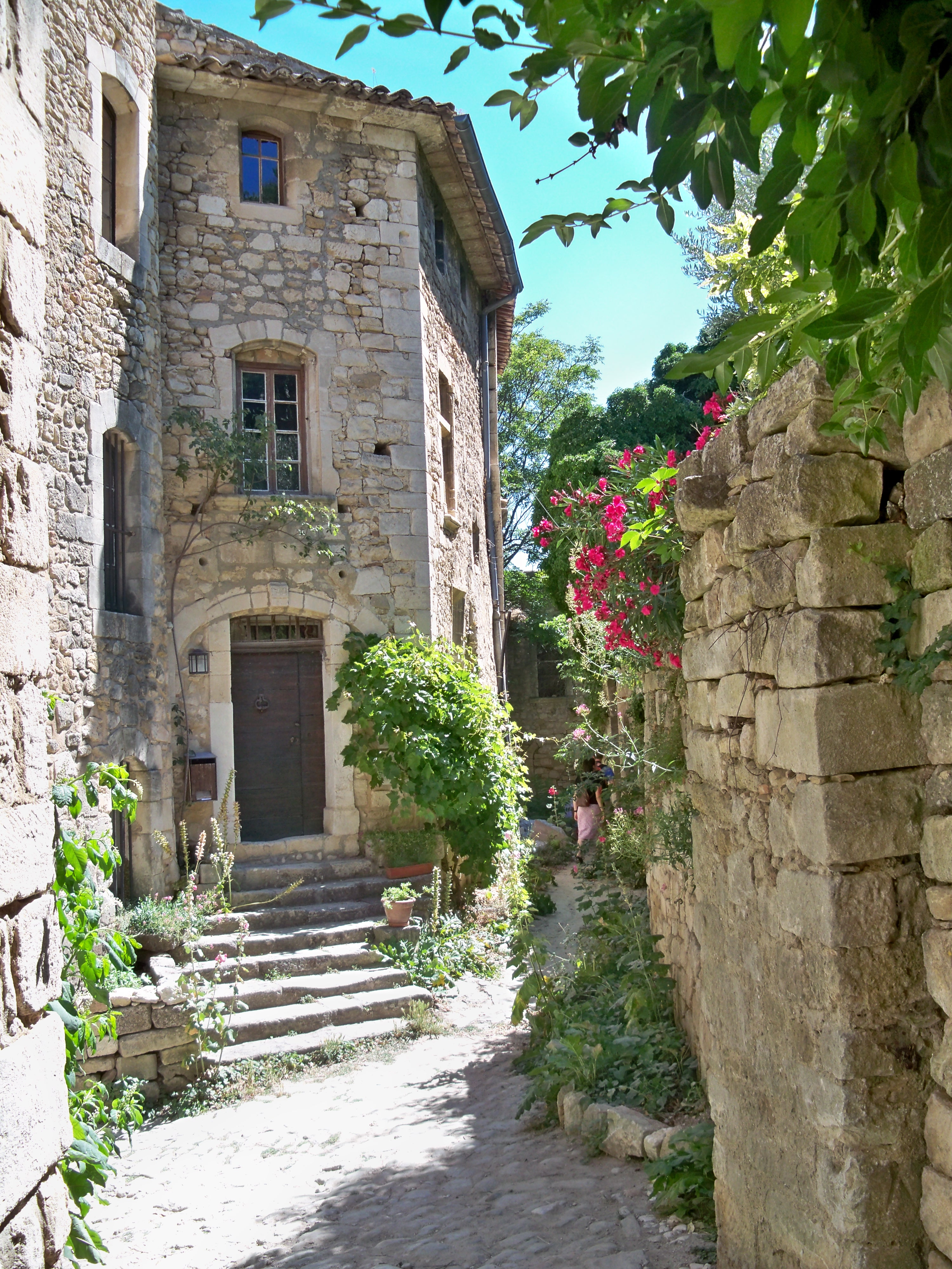 Calade à Oppède le Vieux, Vaucluse, France